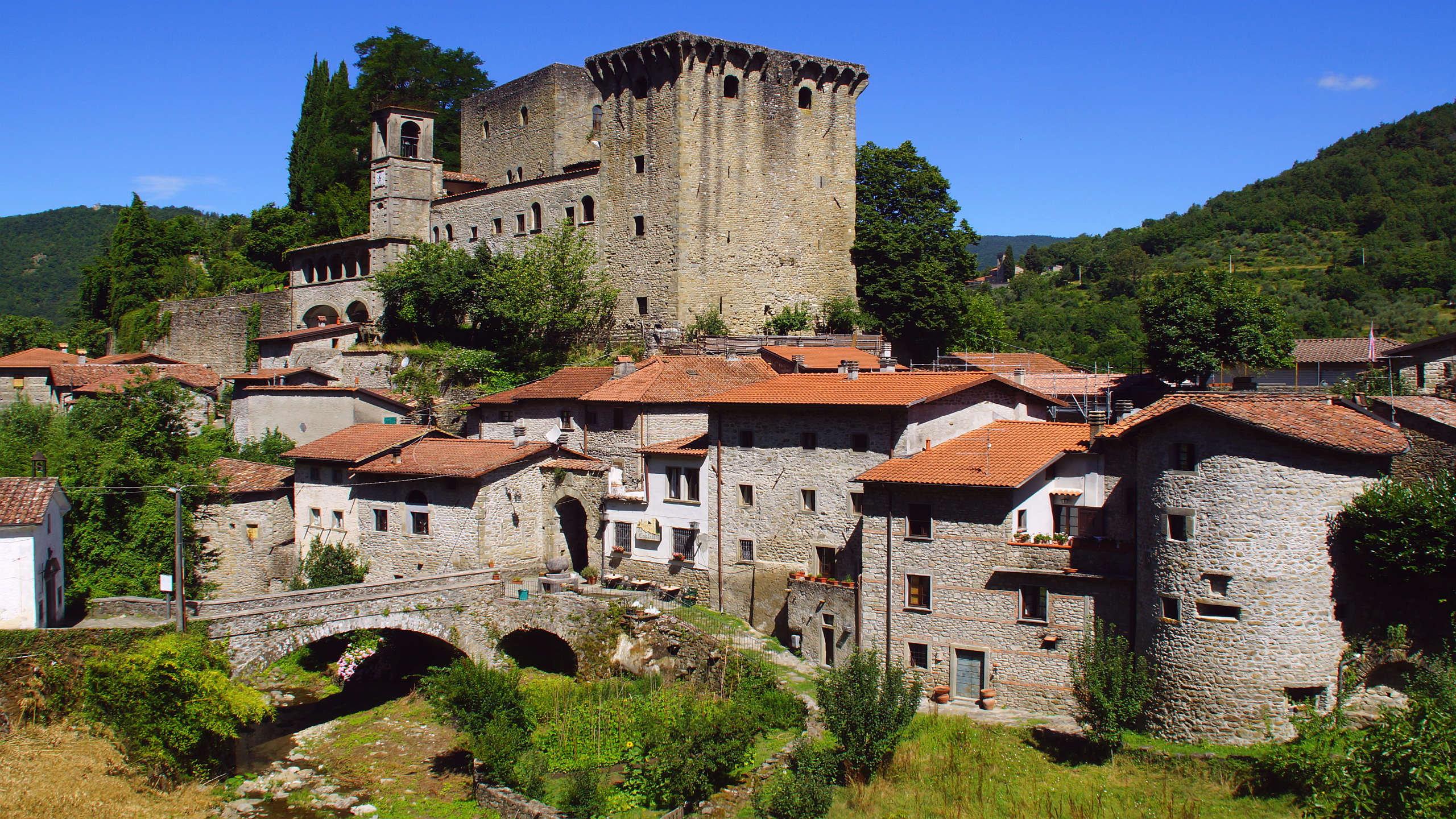 Fortezza di Verrucola Fivizzano - Massa-Carrara - Toscana - Italien - Foto 2014 Wolfgang Pehlemann DSC01291